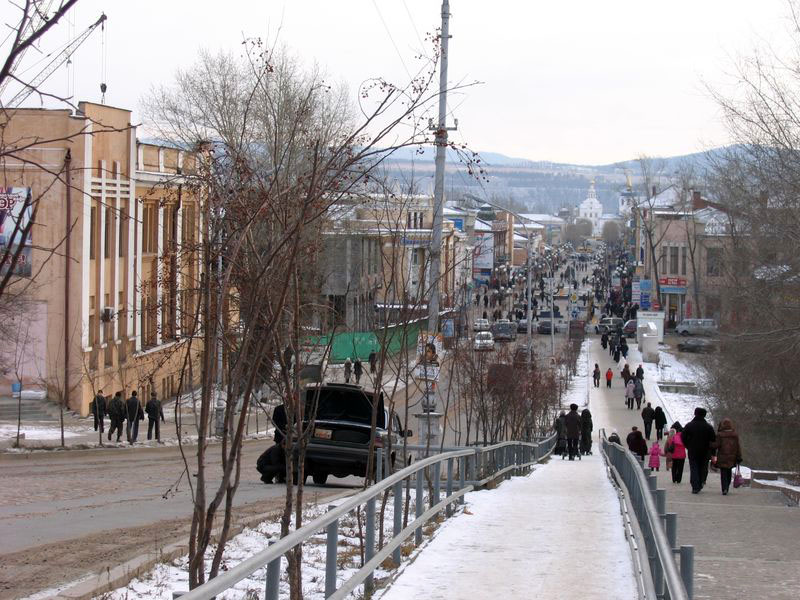 Улица Ленина (вид на юг)